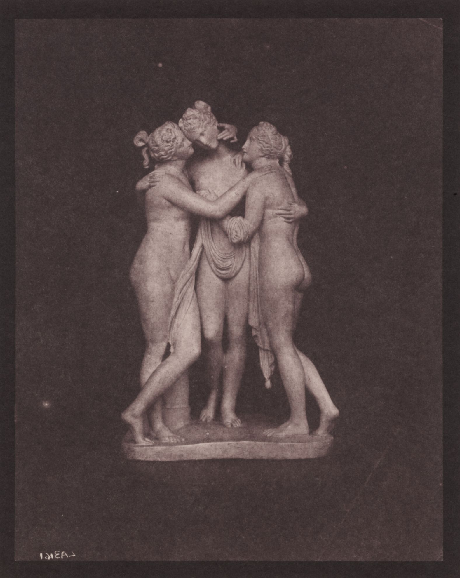 Talbot, William Henry Fox: »Die drei Grazien«